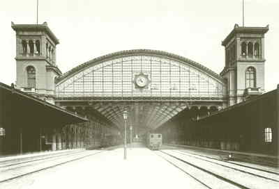 Berlin Potsdamer Bahnhof, rear view